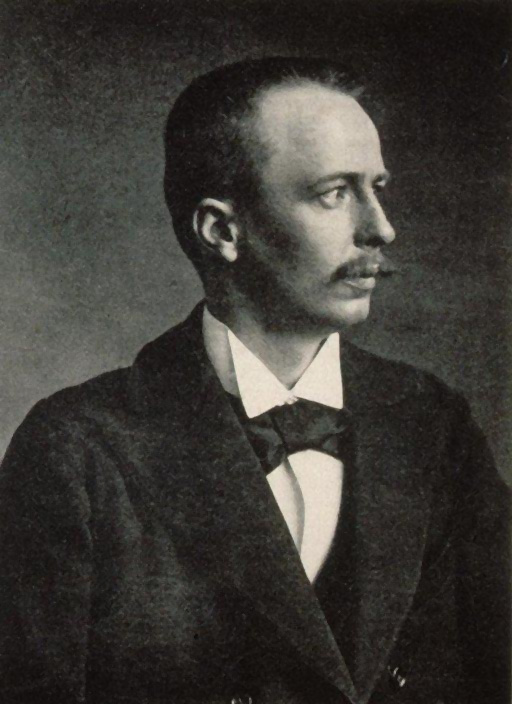 Gustave Stoskopf vers 1896, Buste, 3/4 à dr. Éditeur : Manias J (Strasbourg). Date d'édition : 1896. Bibliothèque nationale et universitaire de Strasbourg